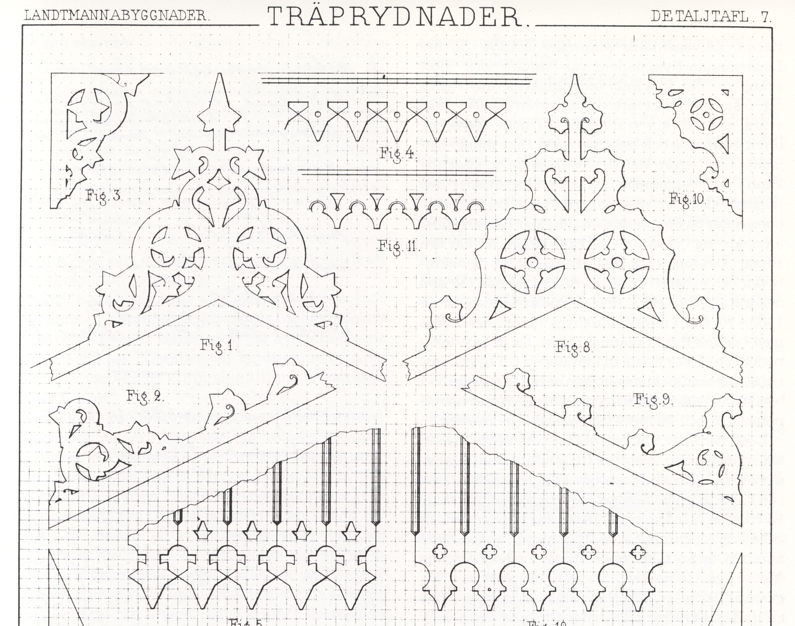 Trädprydnader, lövsågsarbeten, snickarglädje